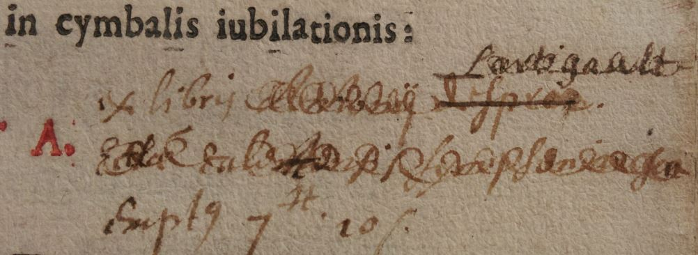 Ex-libris de N. Lartigault.